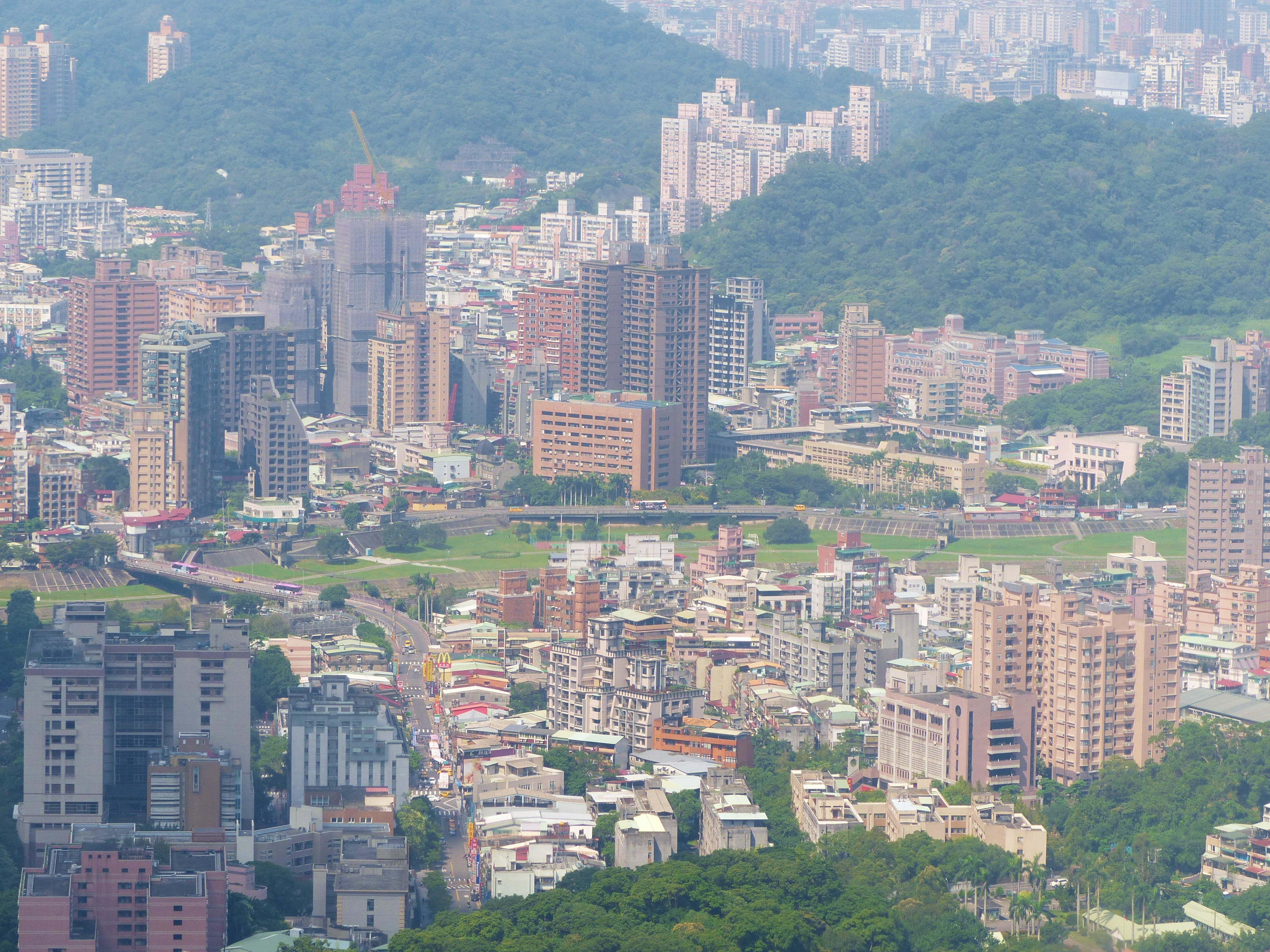 中文（台灣）: 從貓空纜車動物園站～轉角一站間西南俯望臺北市文山區萬興里。